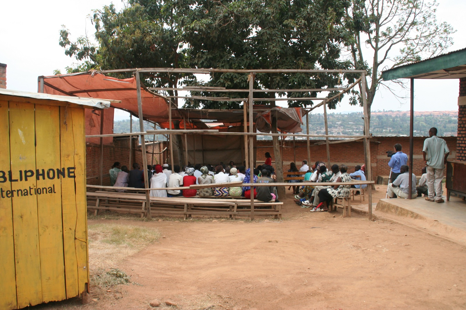 Gacaca Trial